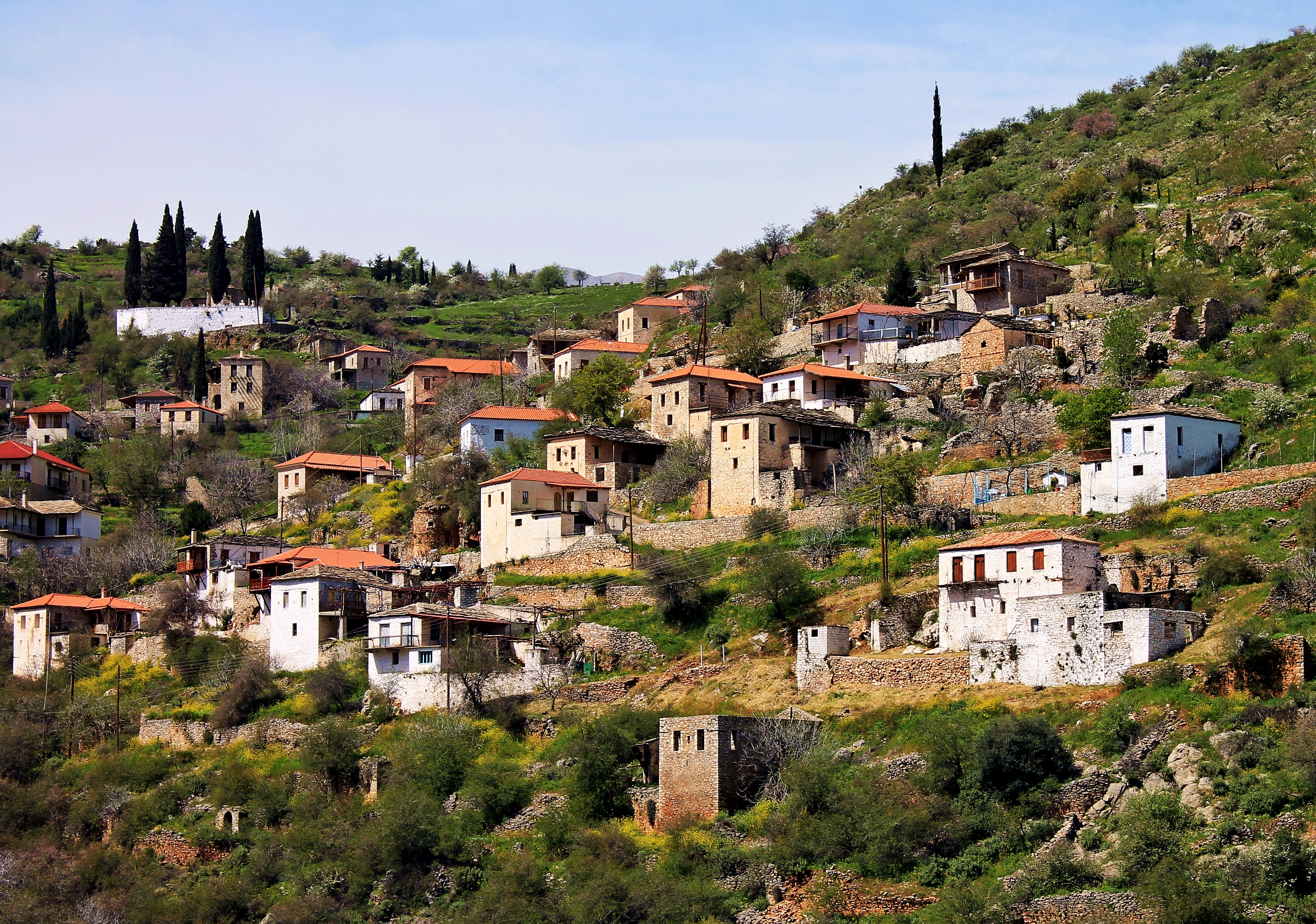 Ευχάριστη έκπληξη των αισθήσεων, ο Πραστός, σημαίνων τόπος του Πάρνωνα. This is a photography of Natura 2000 protected area with ID GR2520006